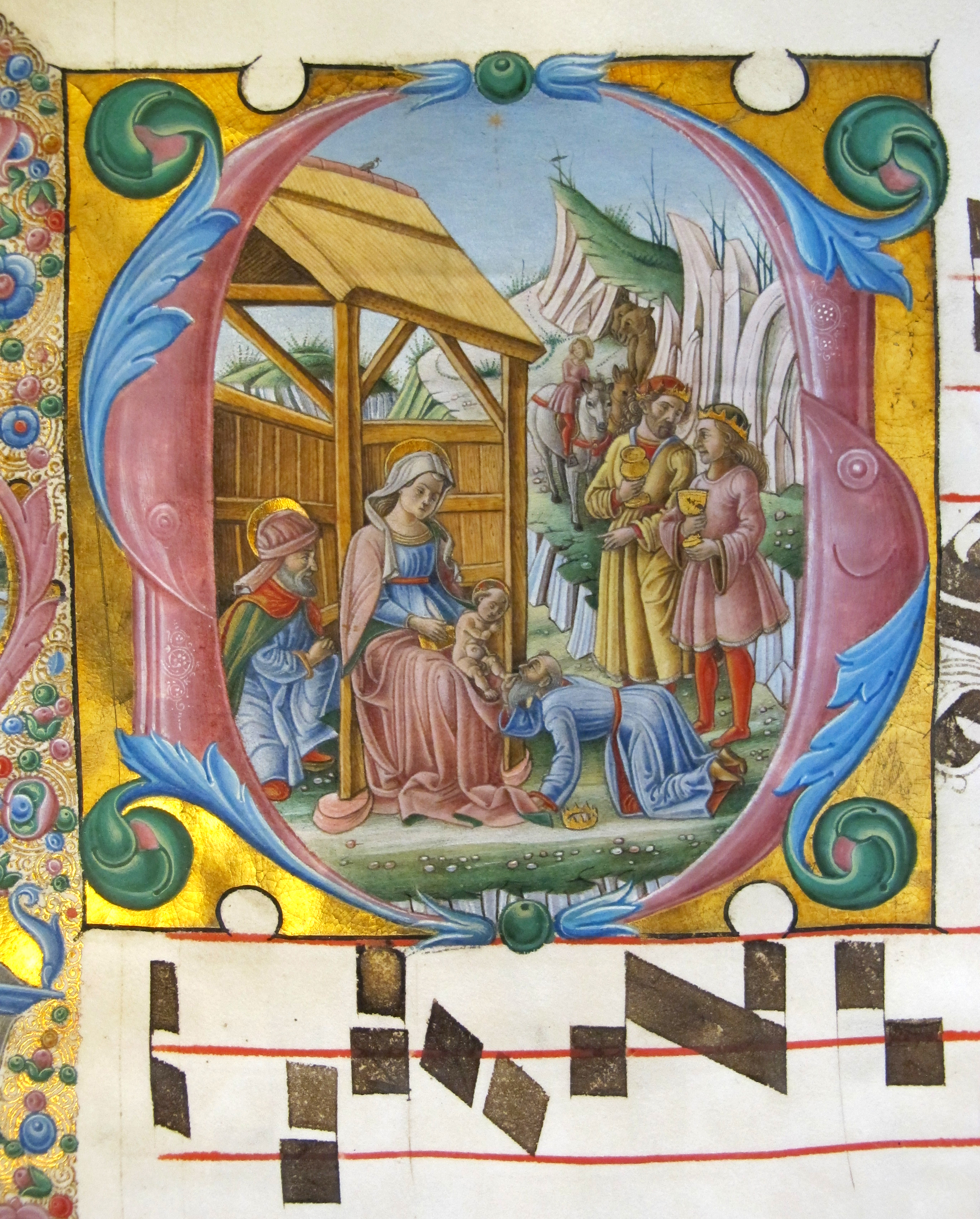 Museo della Cattedrale This is a photo of a monument which is part of cultural heritage of Italy.